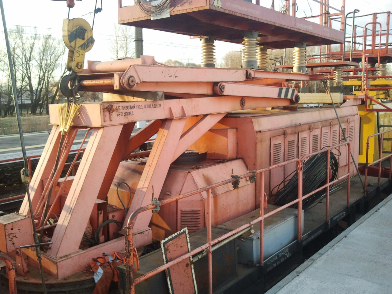 Подъёмная платформа